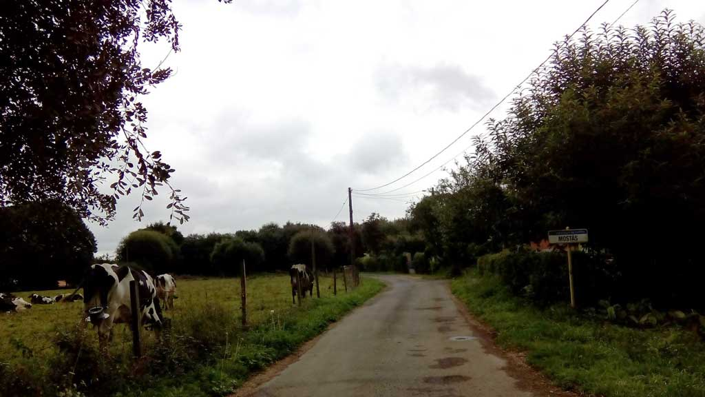 Vista de Mostás, Curtis.